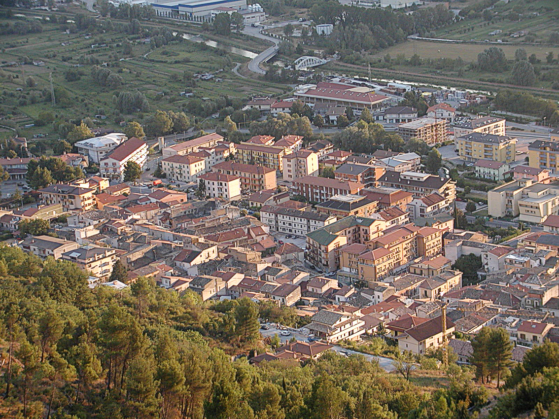 Bilder aus Popoli